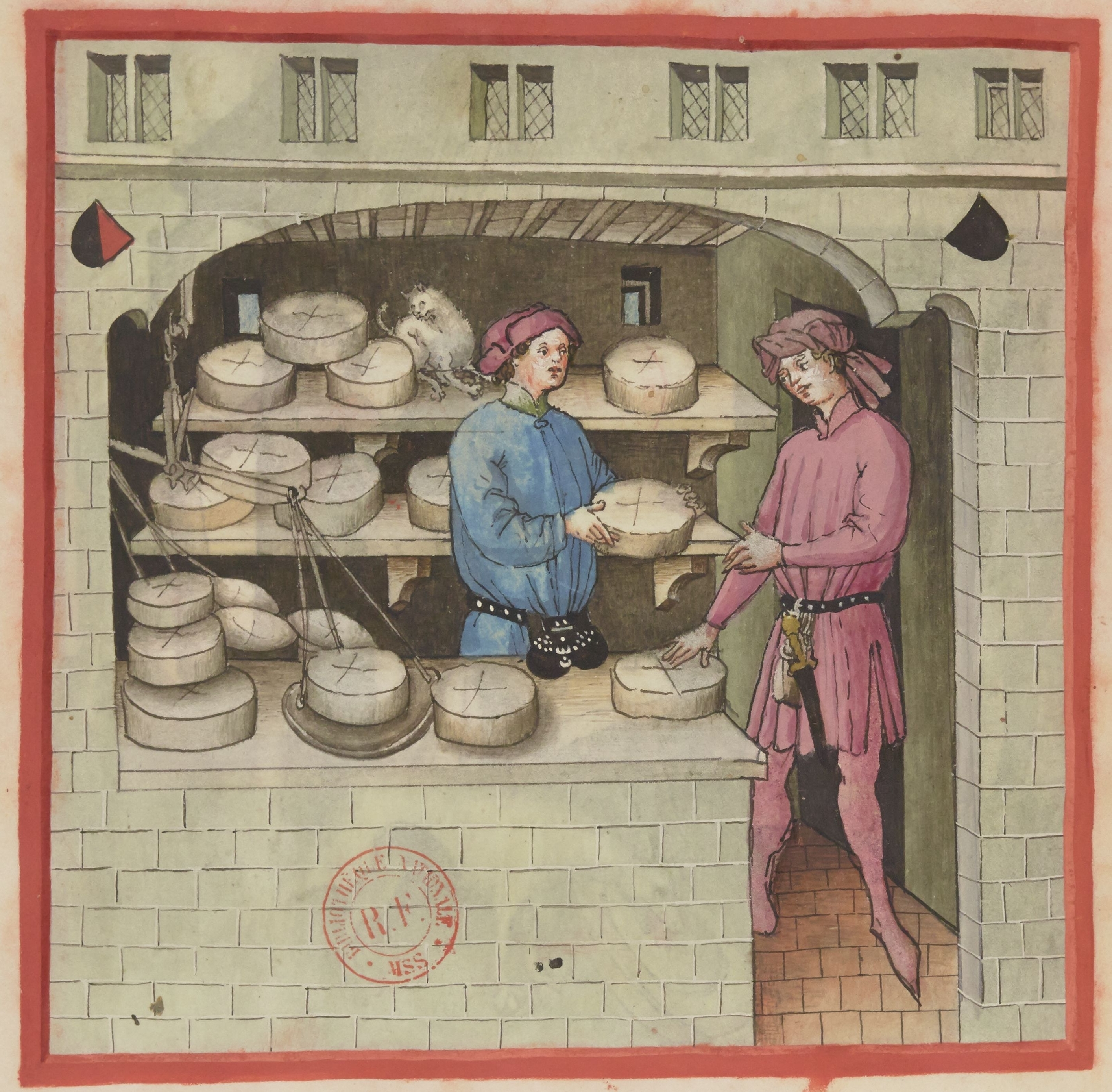 Extrait du manuscrit Tacuinum Sanitatis sur le « caseus vetus », littéralement le « fromage vieux » (exemplaire de la BnF numéro 9333, folio 58, verso).